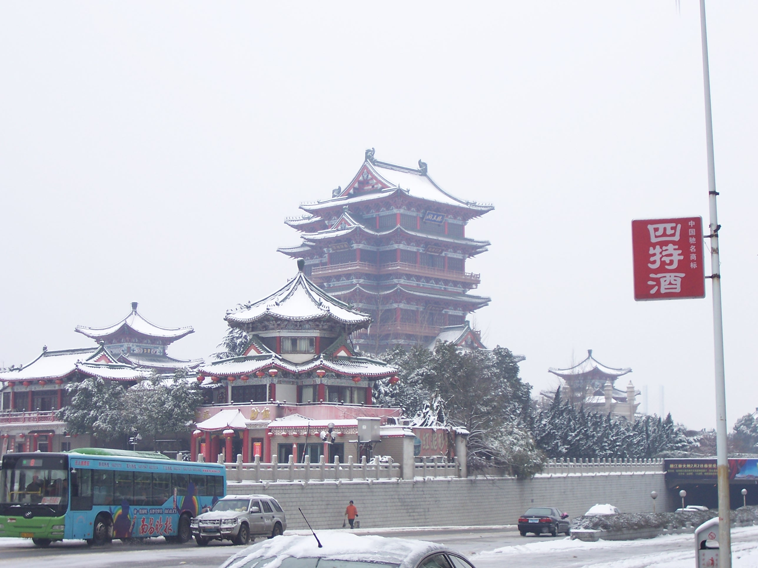 Tengwang Pavilion